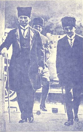 Mustafa Kemal seeing İsmet off Lausanne.